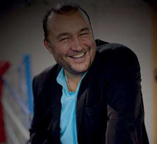 Christophe Tiozzo est un boxeur professionnel, né le 1er juin 1963 à Saint-Denis.